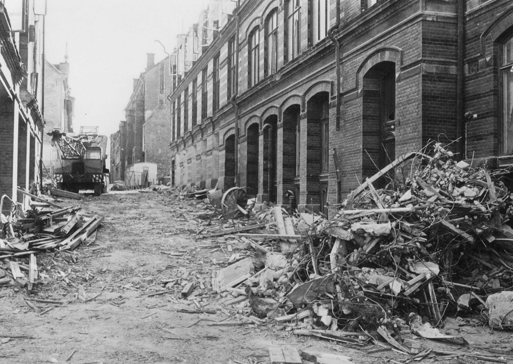 Norra Smedjegatan, gatan som försvann, där finns nu Gallerian (Stockholm)